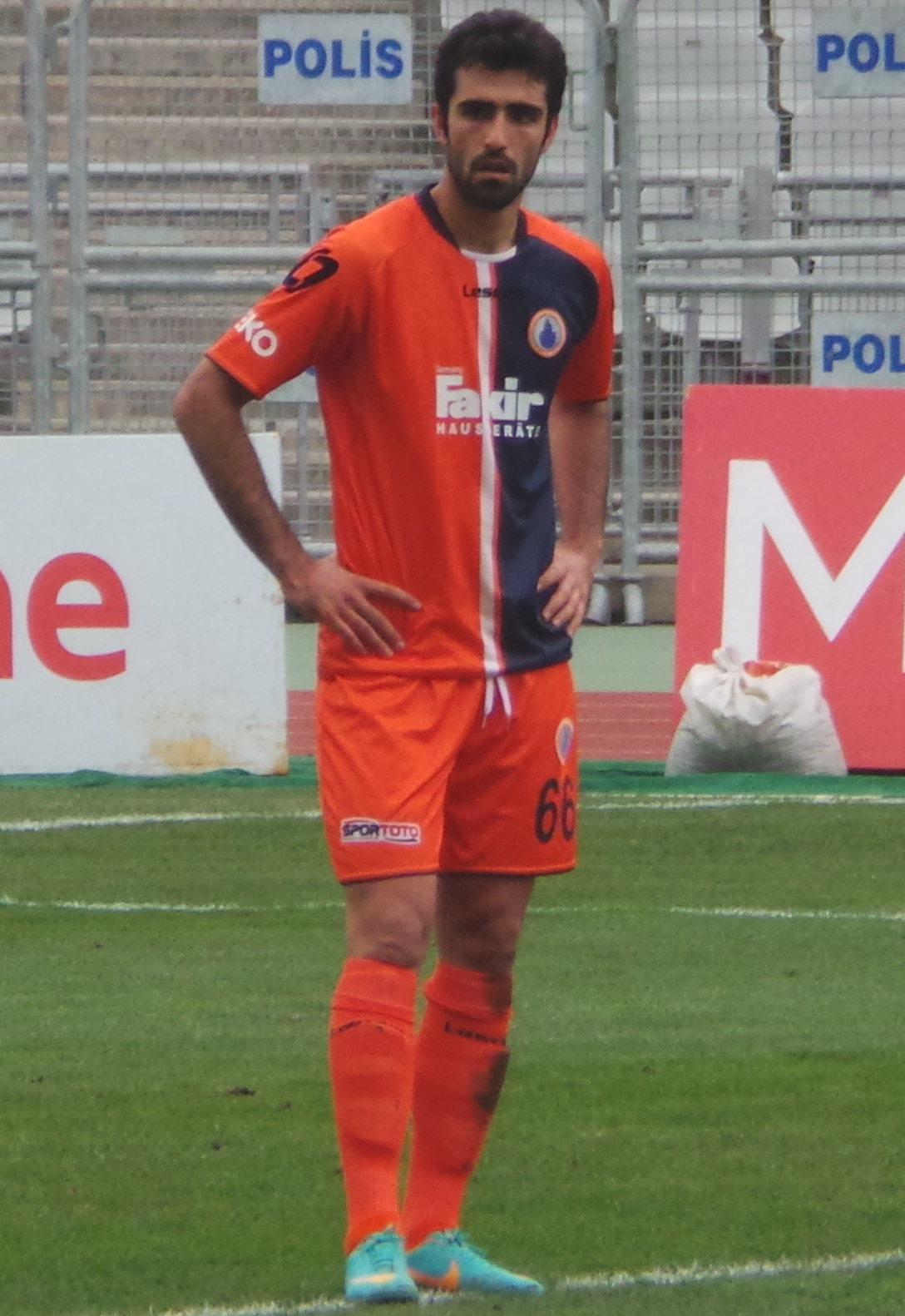 Gençer Cansev